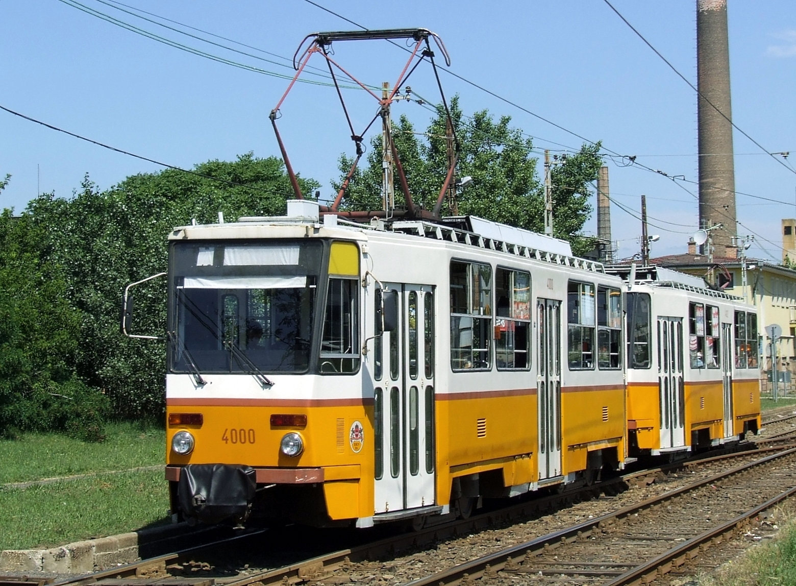 Tatra T5C5 típusú villamos Budapesten. A prototípus 4000-es és a 4002-es pályaszámú kocsi a MaVITE "Tatrával Pacsirtától Kamaráig - 30 éves a Tatra T5C5" elnevezésű különmenetkor.